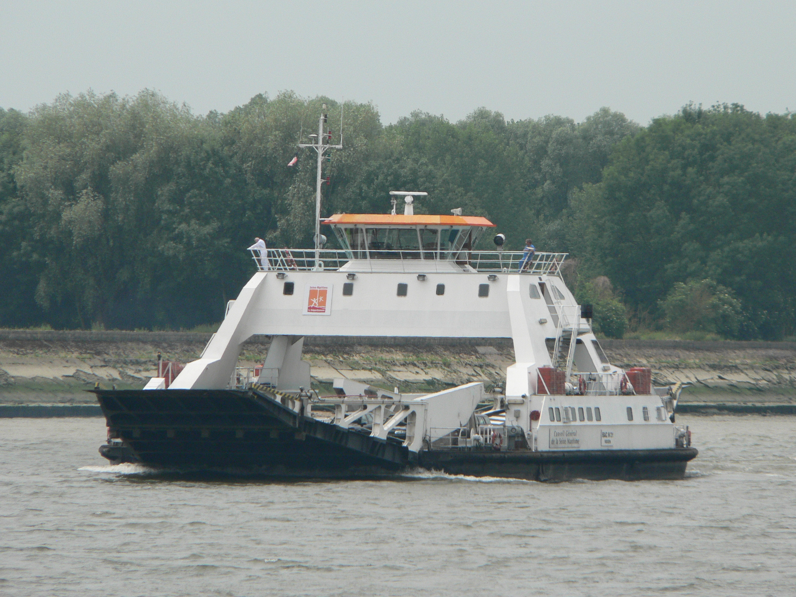 Bac 21 en transit à Caudebec en Caux (IMO 8741662)Photo prise le 19 juin 2006Auteur : Marc LigerCopyright : image sous GFDL Marc Liger